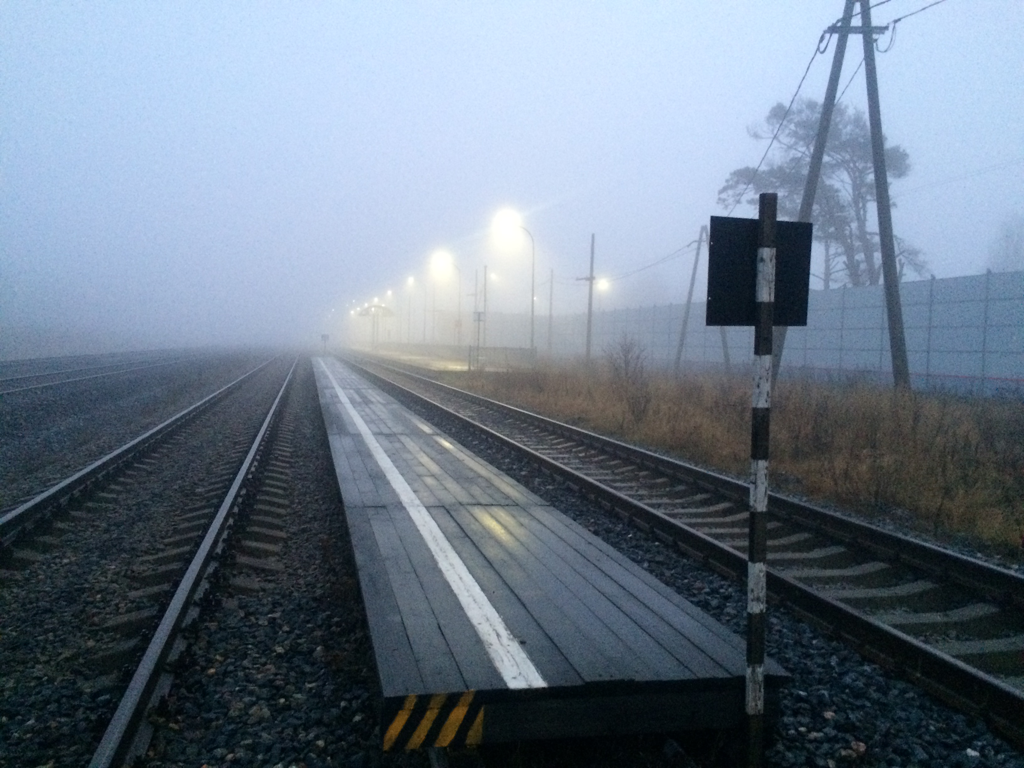 Ермилово